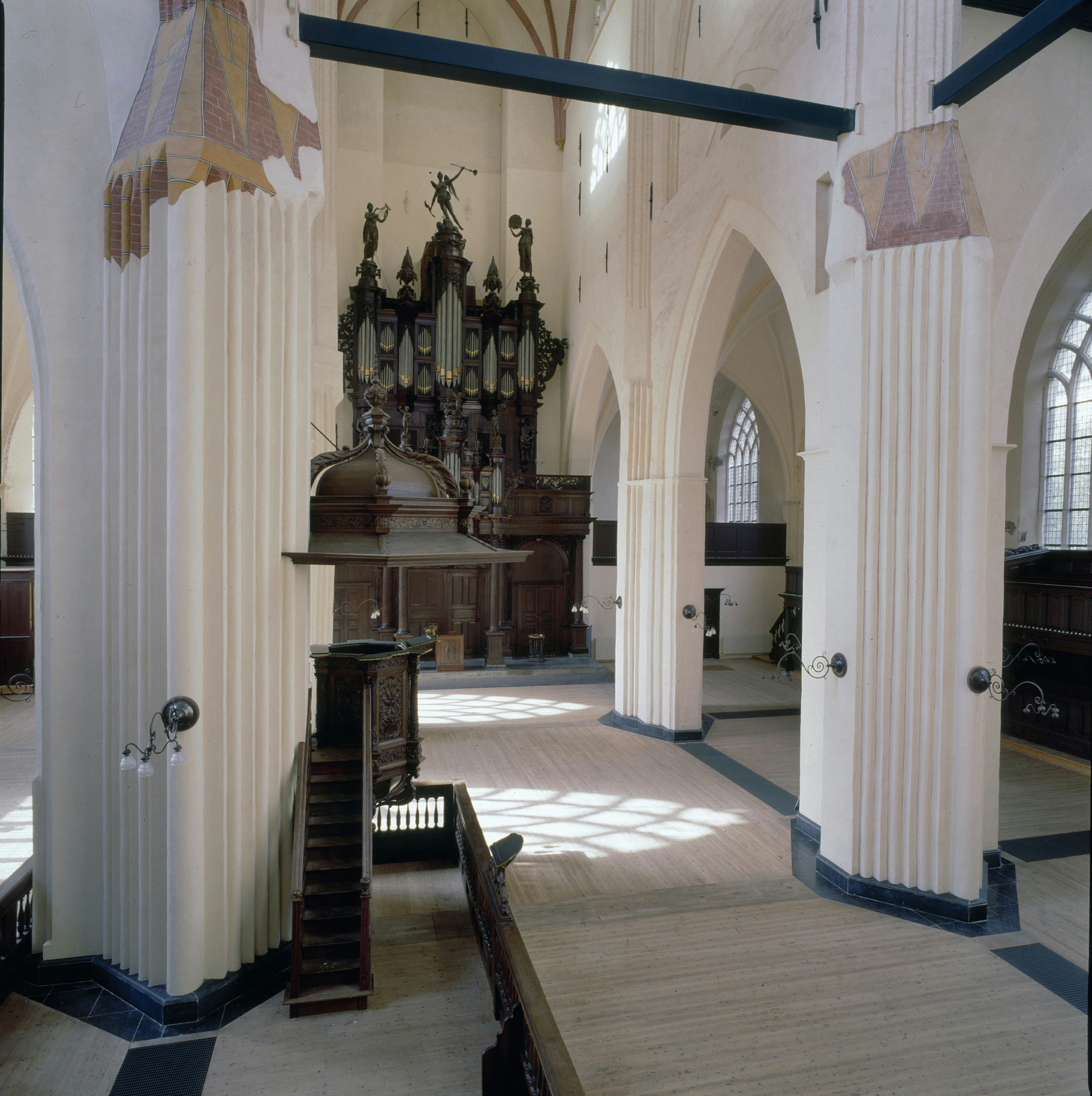 Der AA-kerk: Interieur, schip met preekstoel en orgel